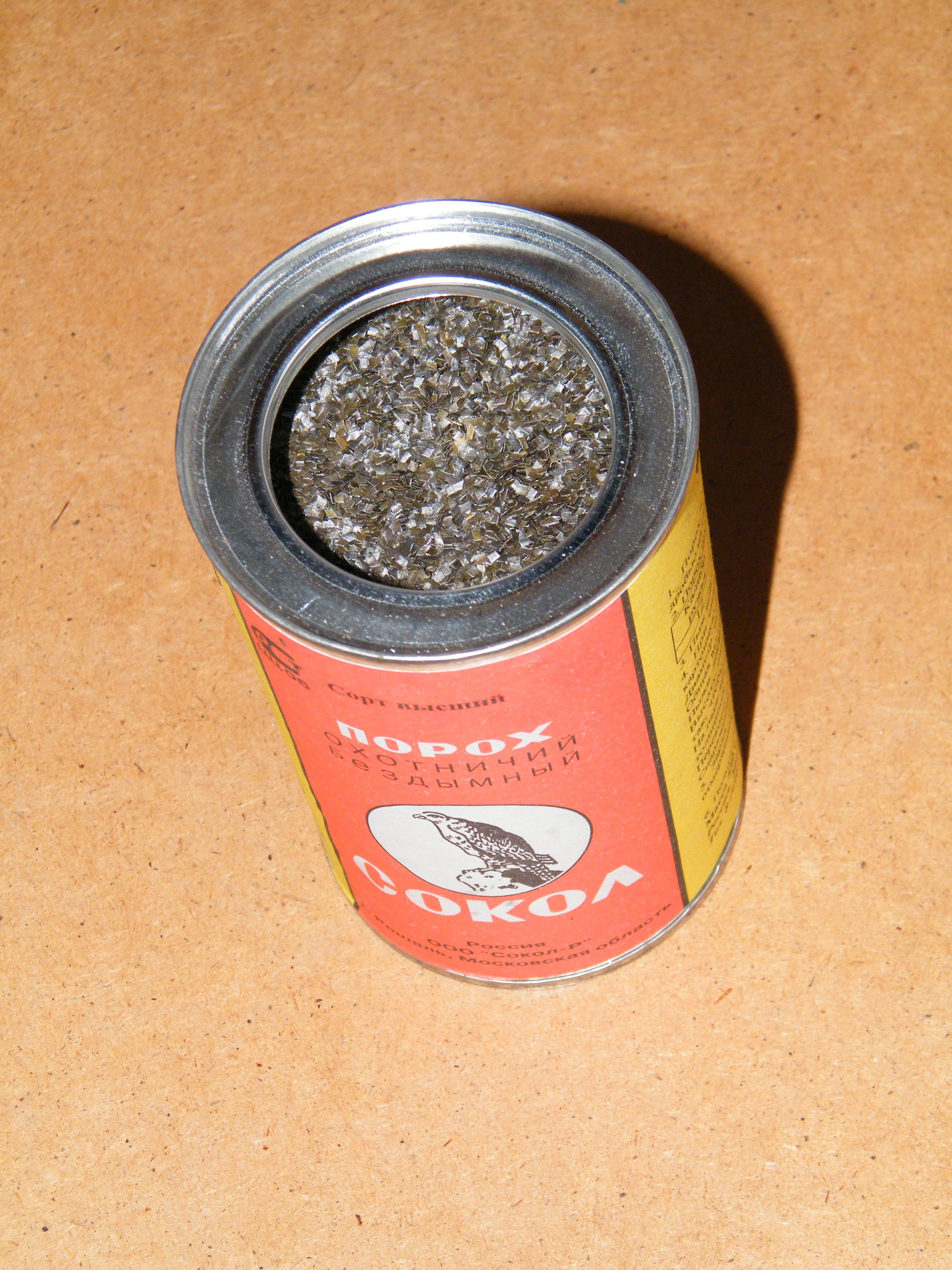 Бездымный порох "Сокол" (Россия)